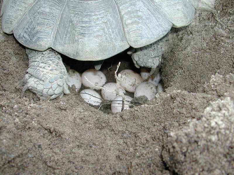 Deposition_eggs_Testudo_marginata_sarda.jpg Sardegna Italy